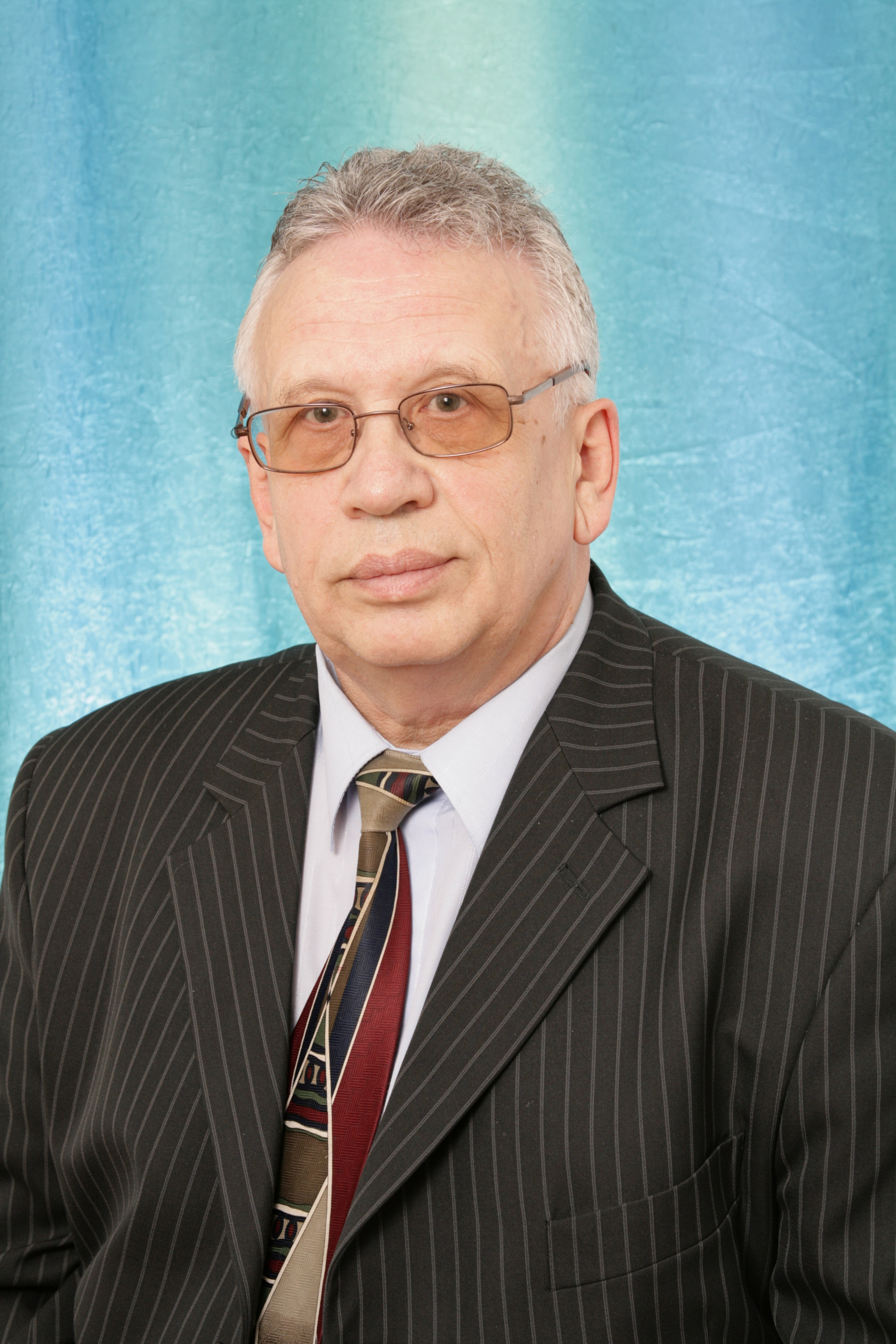 Фото для страницы Канке Виктора Андреевича